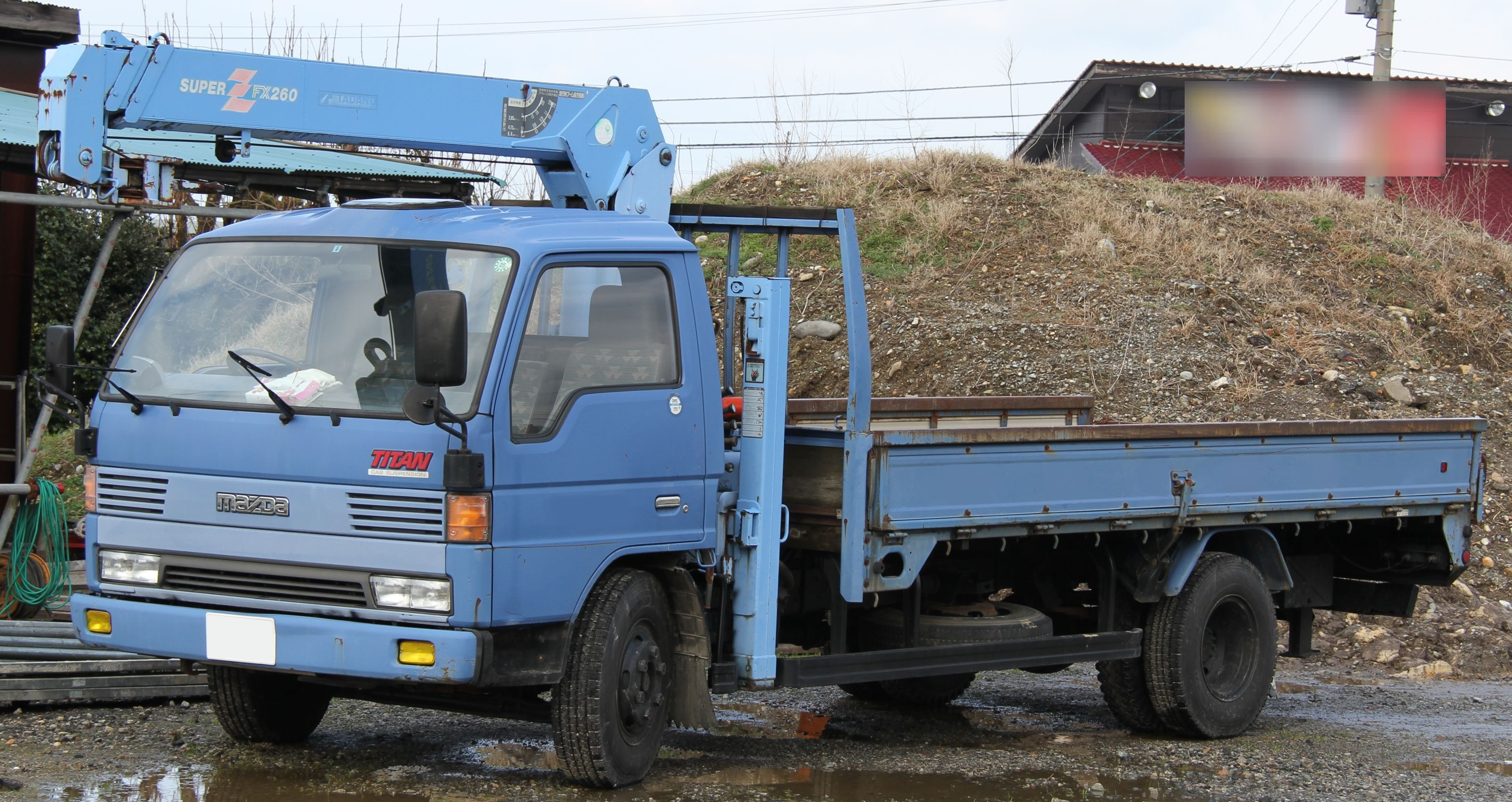 Mazda Titan